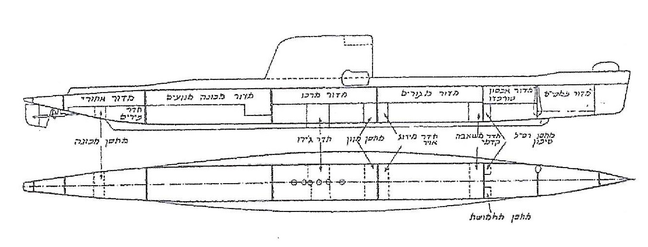 תרשים חלוקה פנימית של הצוללת דקר